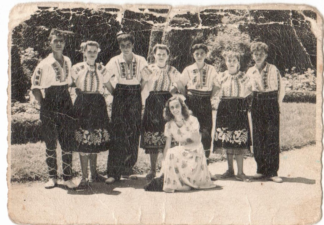 Фолклорен танцов състав с ръководител Дарина Янева